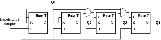 Créé par Lucien Duval 6 janvier 2006 à 15:57 (CET)